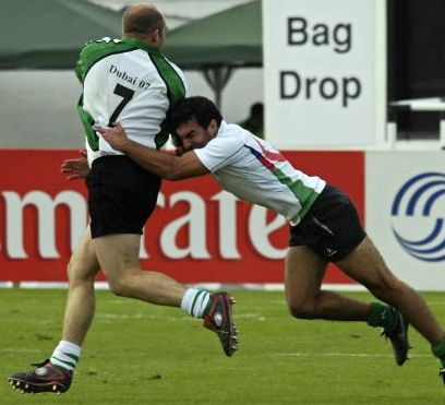 З.Садмалиев на турнире в Дубае